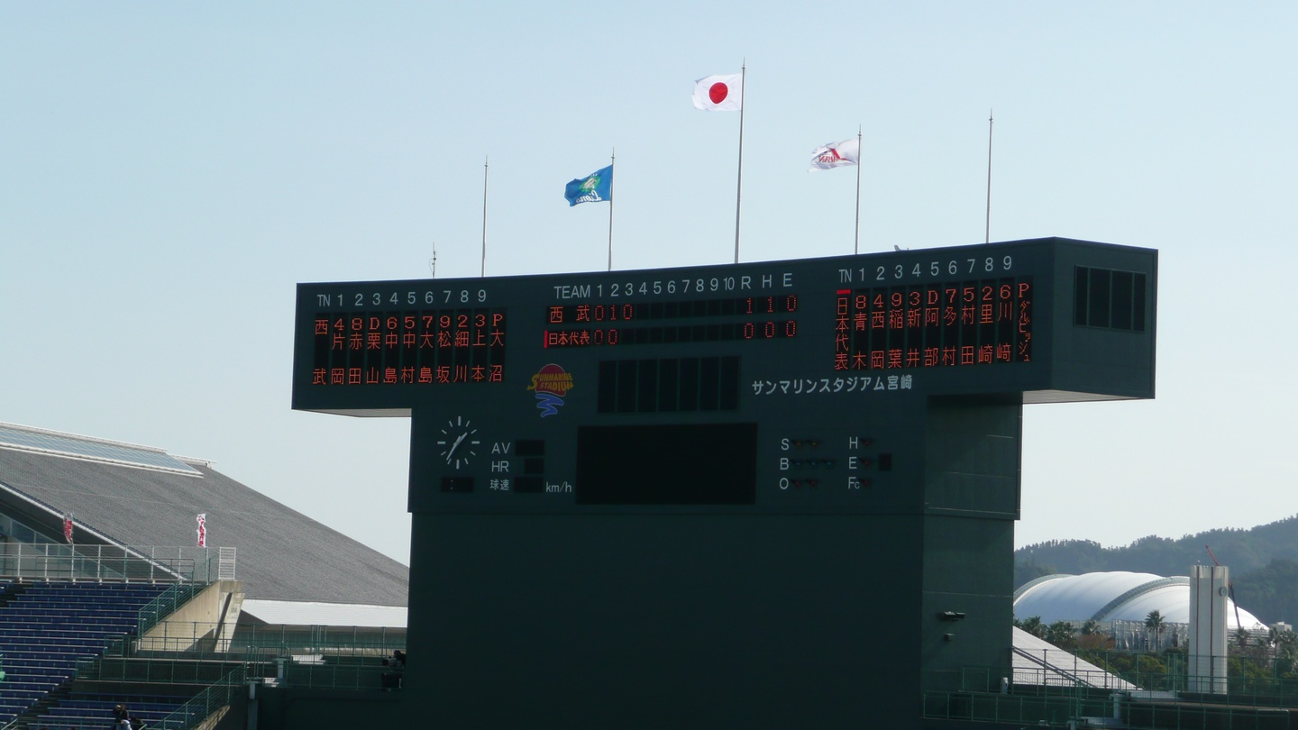 サンマリンスタジアム宮崎のスコアボード（宮崎県総合運動公園硬式野球場 - 県総合運動公園、宮崎市）北京五輪日本代表と西武ライオンズとの練習試合。